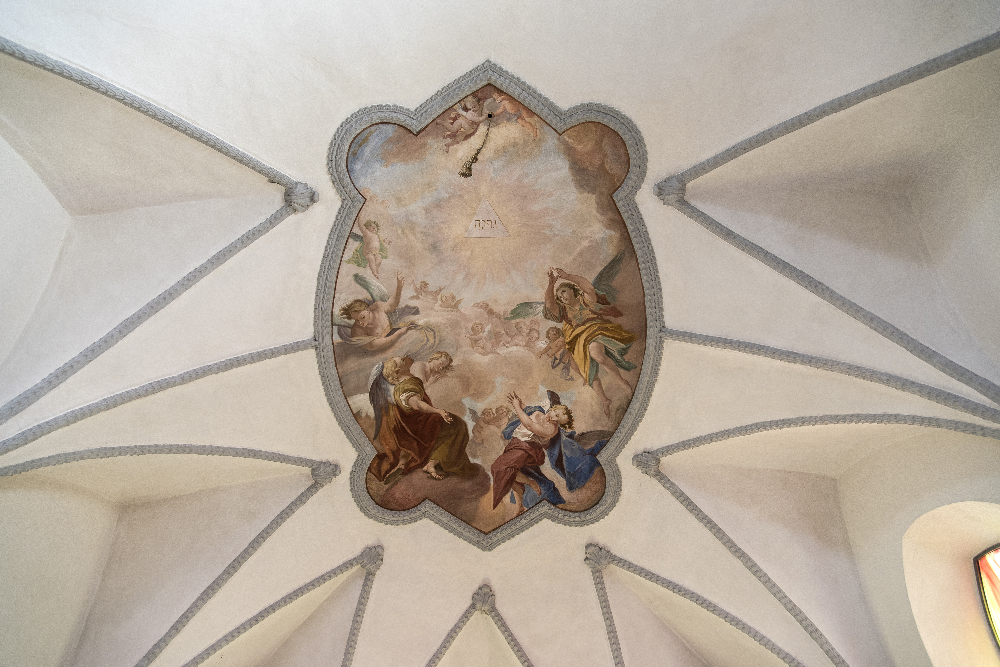 Kath. Pfarrkirche hl. Geist - Das Zeiller - Fresko